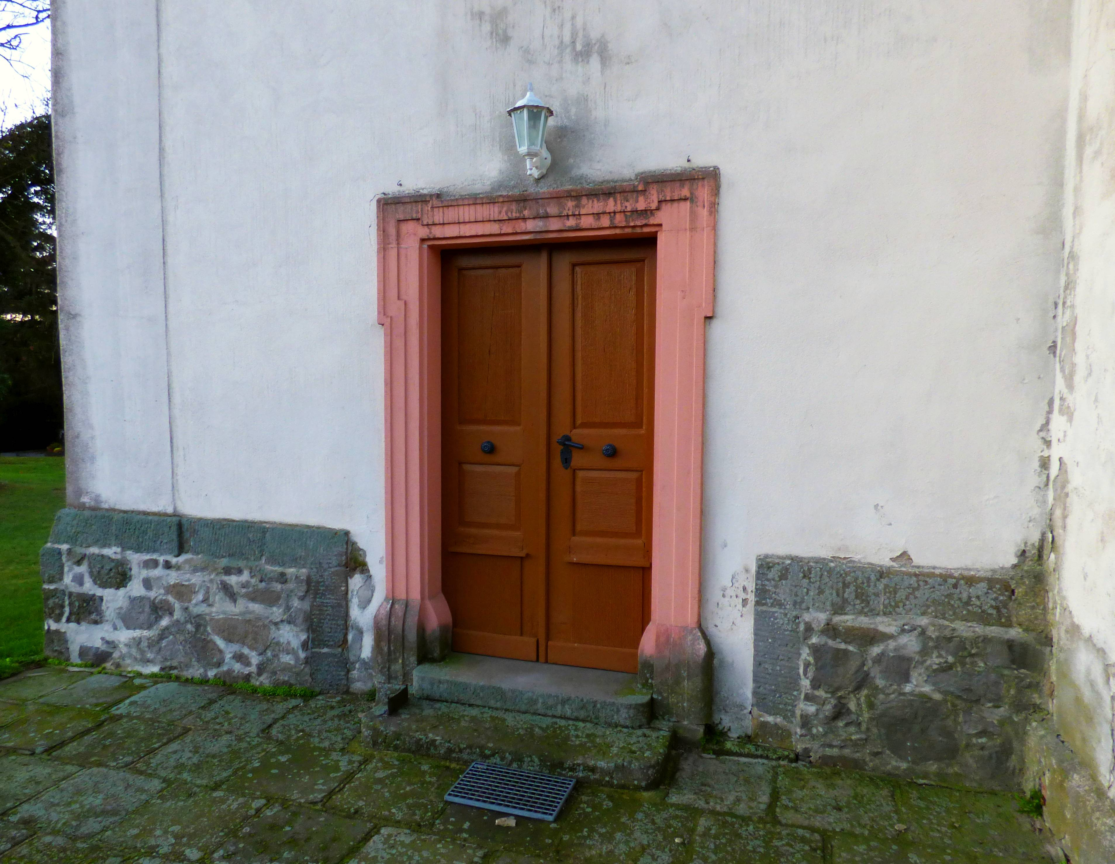 Pforte Turm der Dorfkirche Fichtenberg (Mühlberg/Elbe)